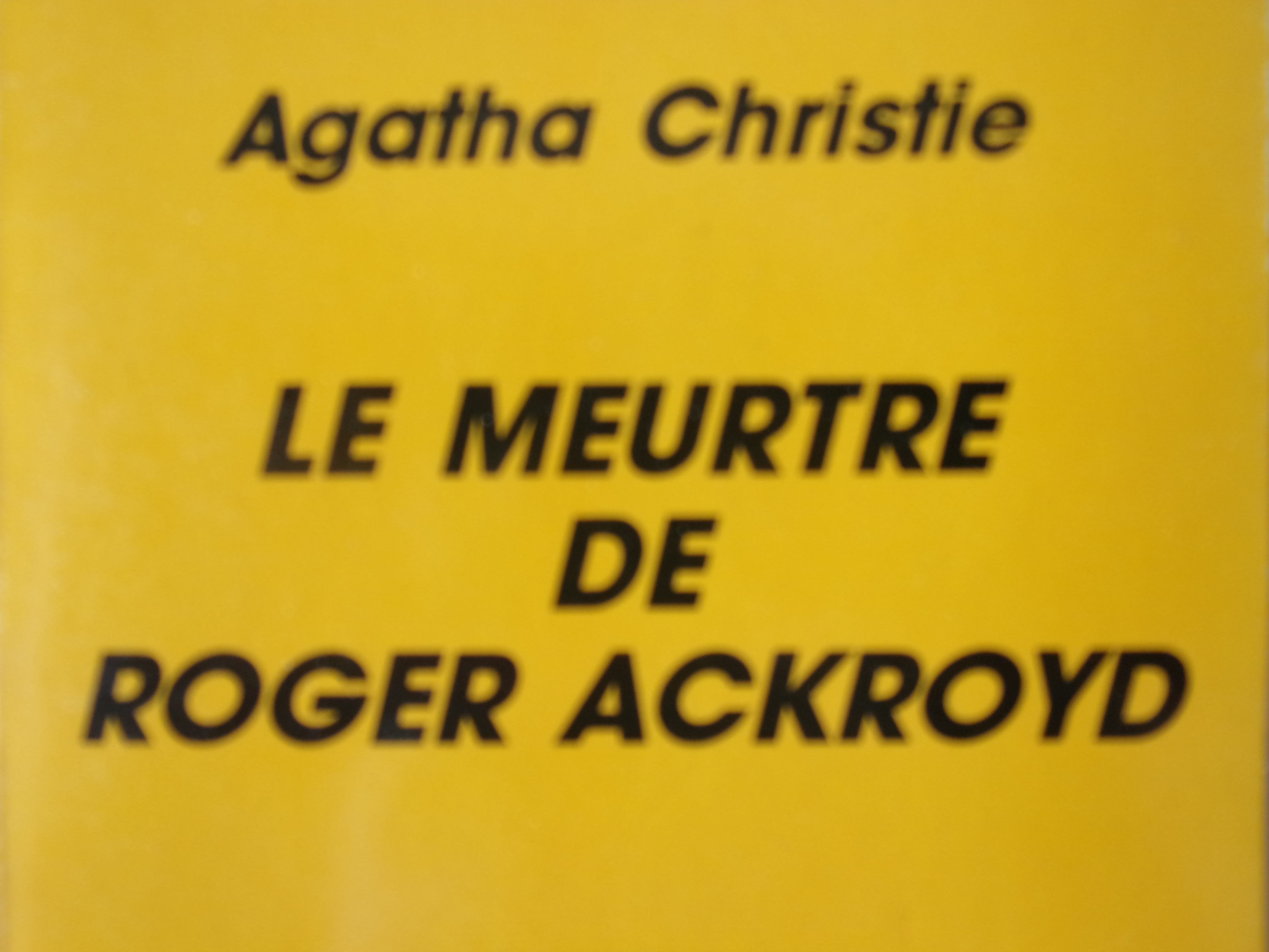 Présentation de la page de couverture du roman dans une édition française